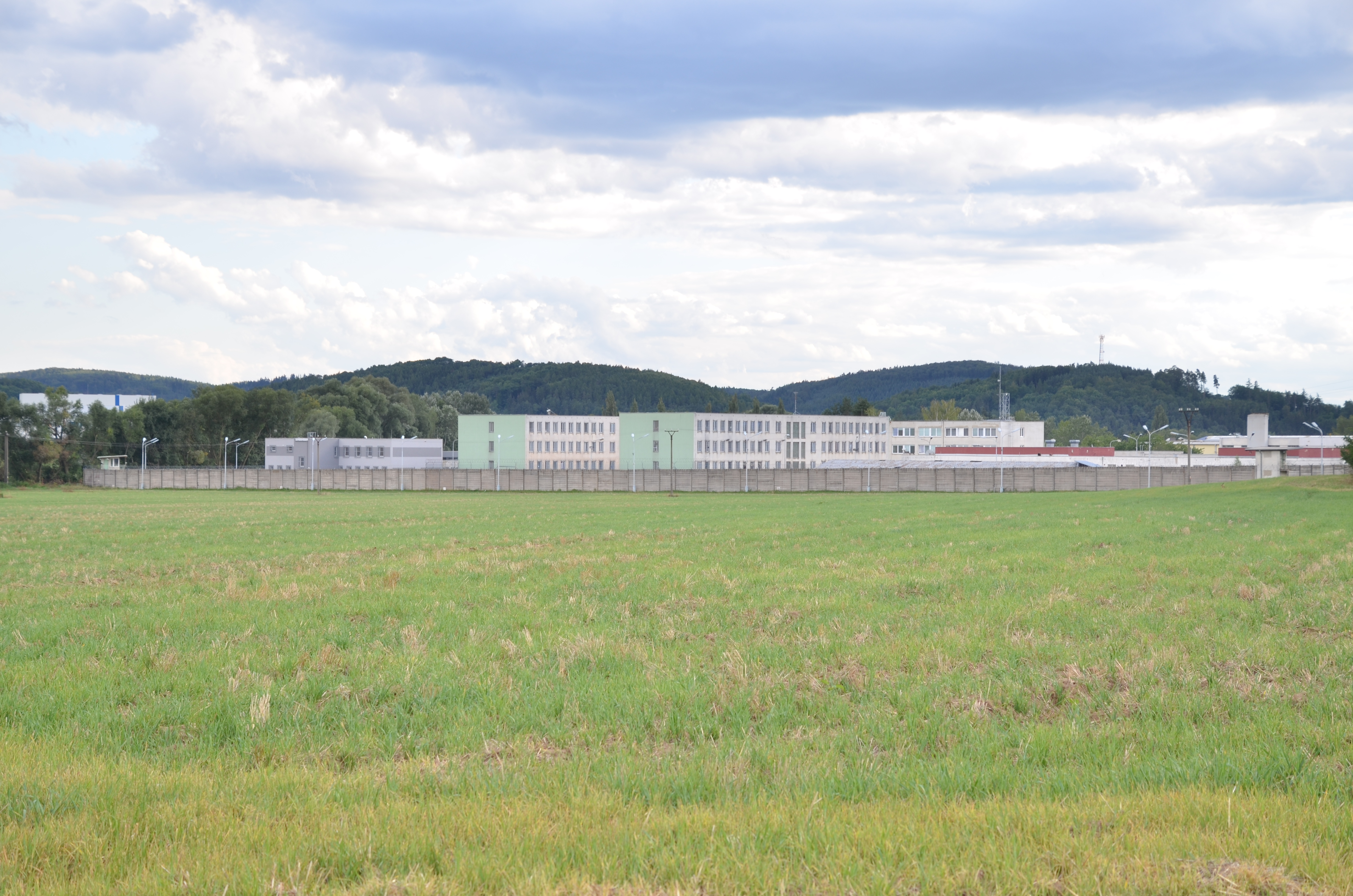 Věznice Kuřim; fotografováno od severovýchodu